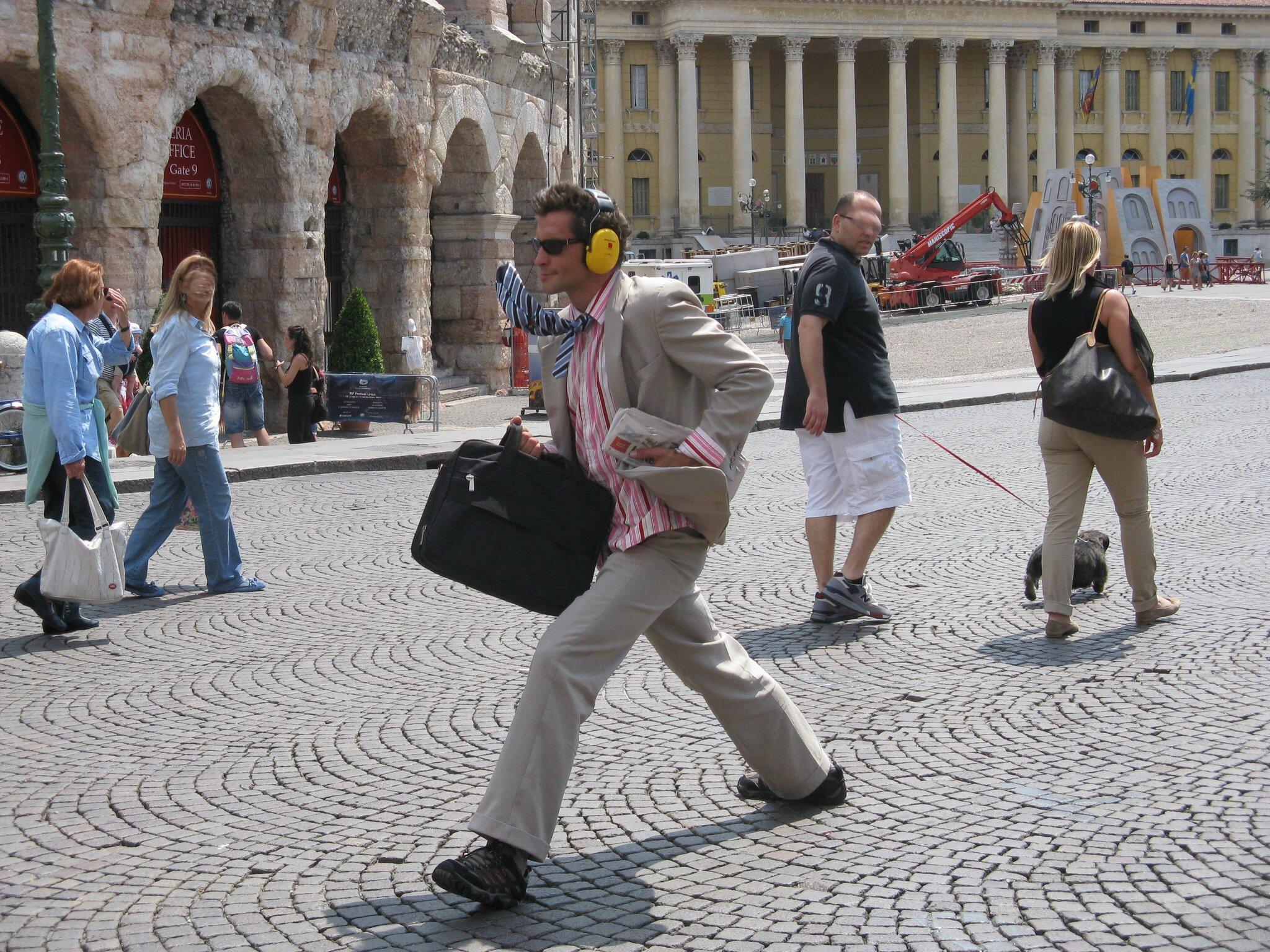 Artista di strada a Verona (zona Arena). Una statua vivente raffigurante un impiegato della city in corsa contro il tempo.